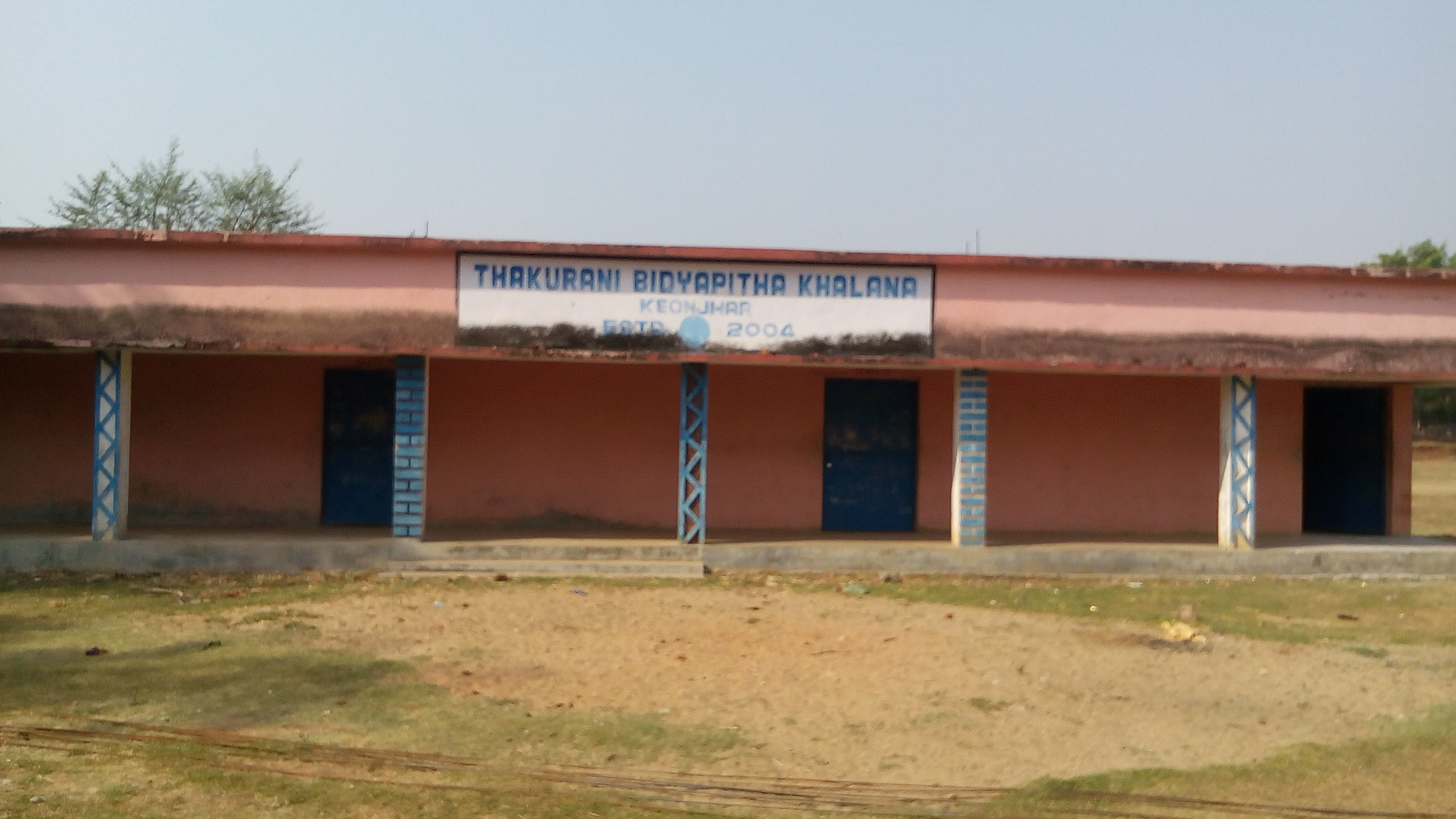 thakurani bidyapitha,khalana